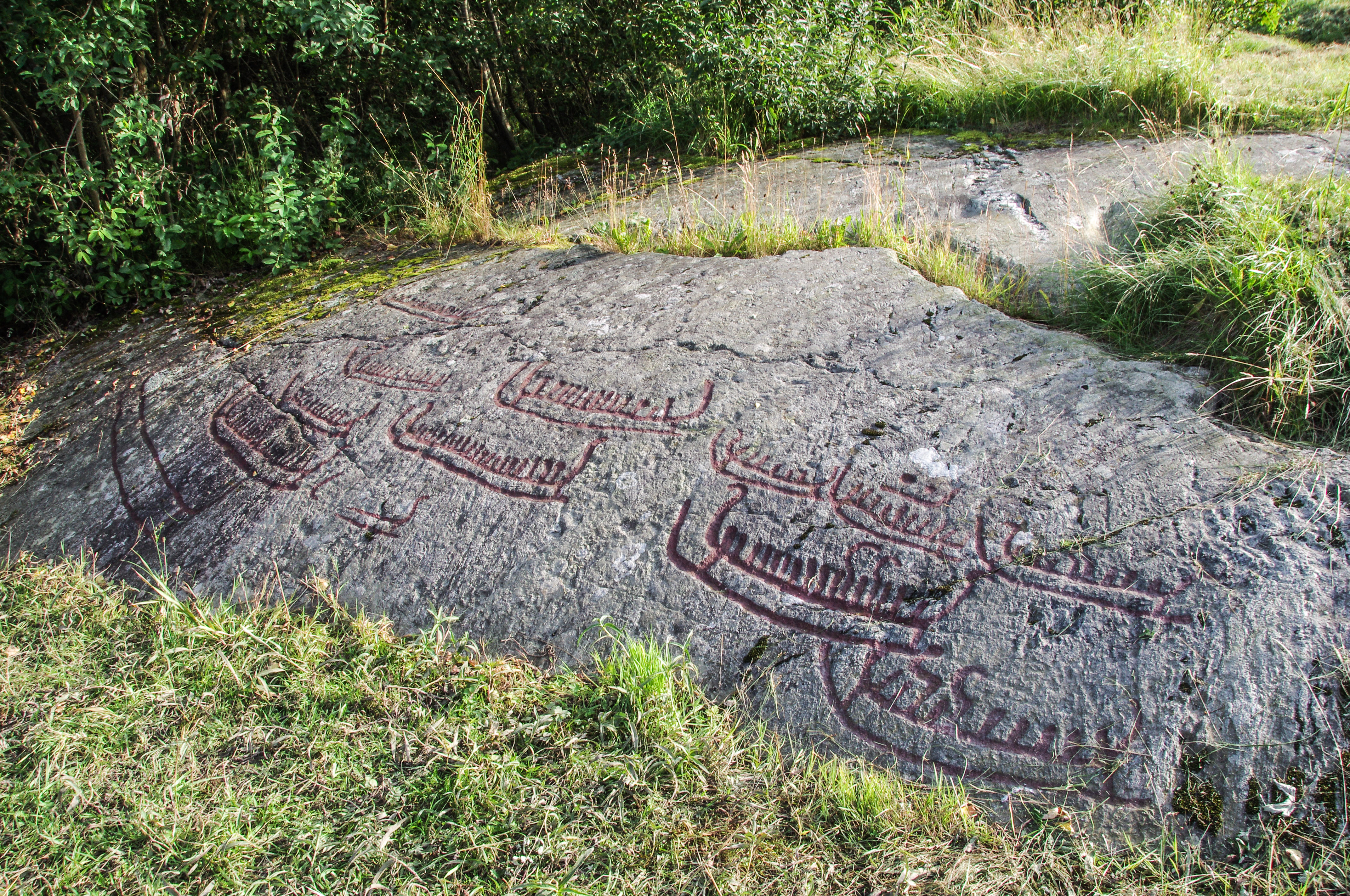 Hällristning, RAÄ-nummer Klövedal 11:1